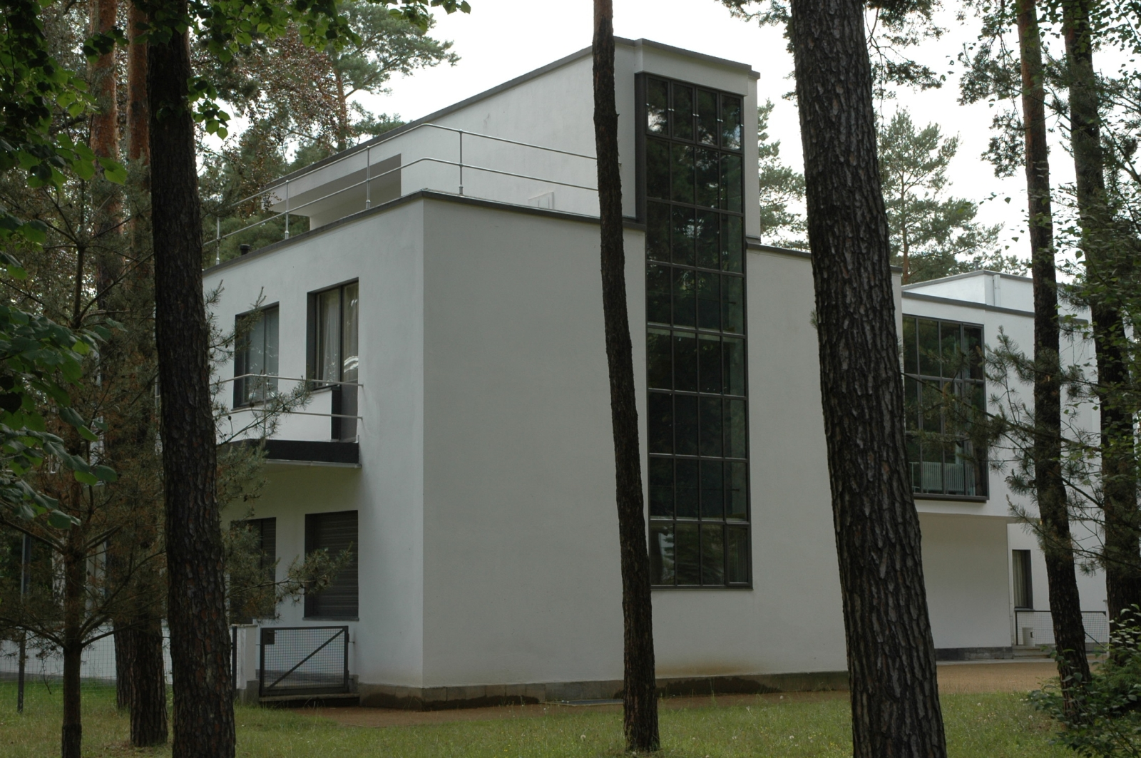 Bauhaus-Dessau - Meisterhäuser in der Friedrich-Ebert-Allee